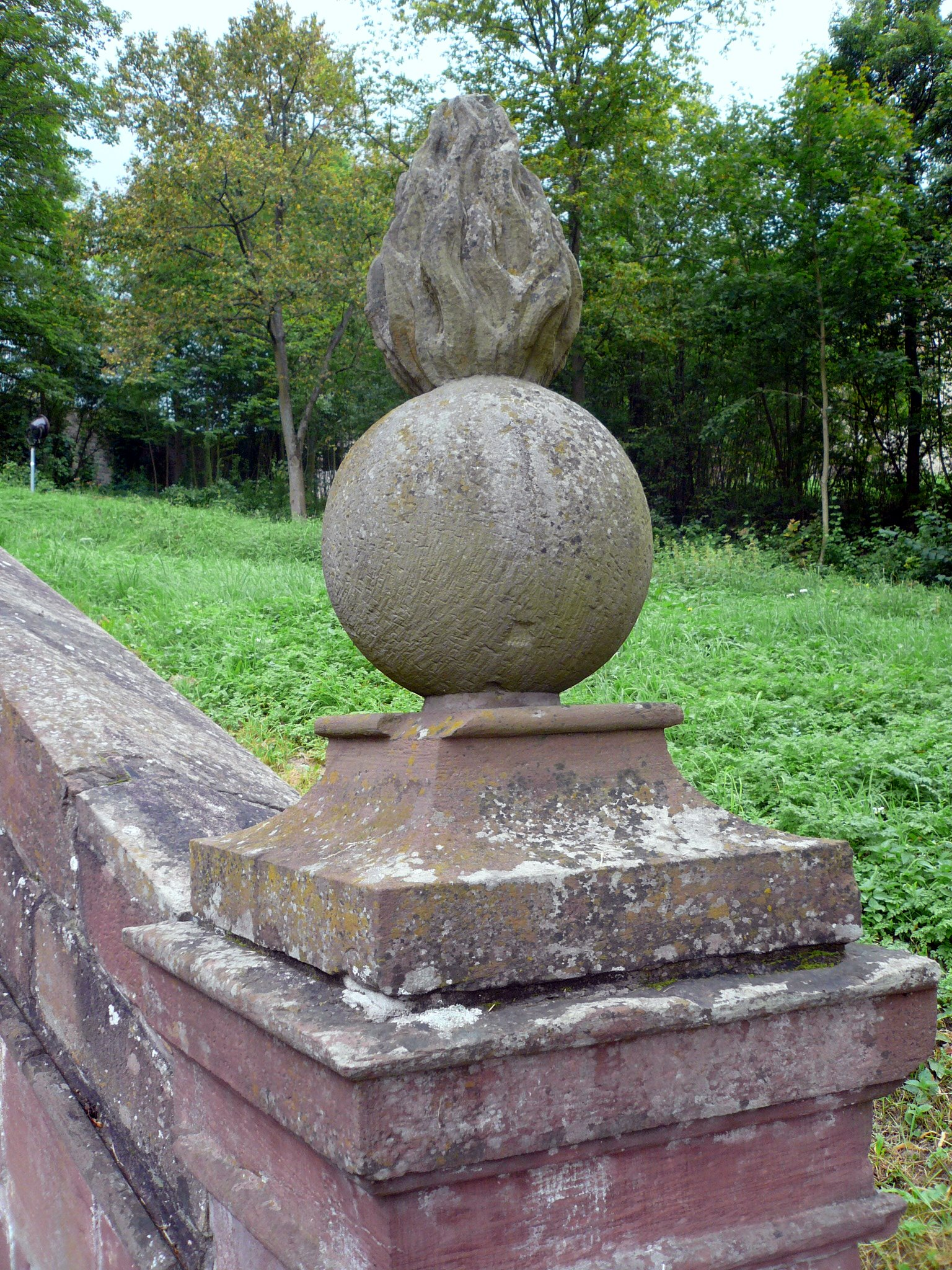 Kapellenkreuzweg Kloster Altstadt, Station 12